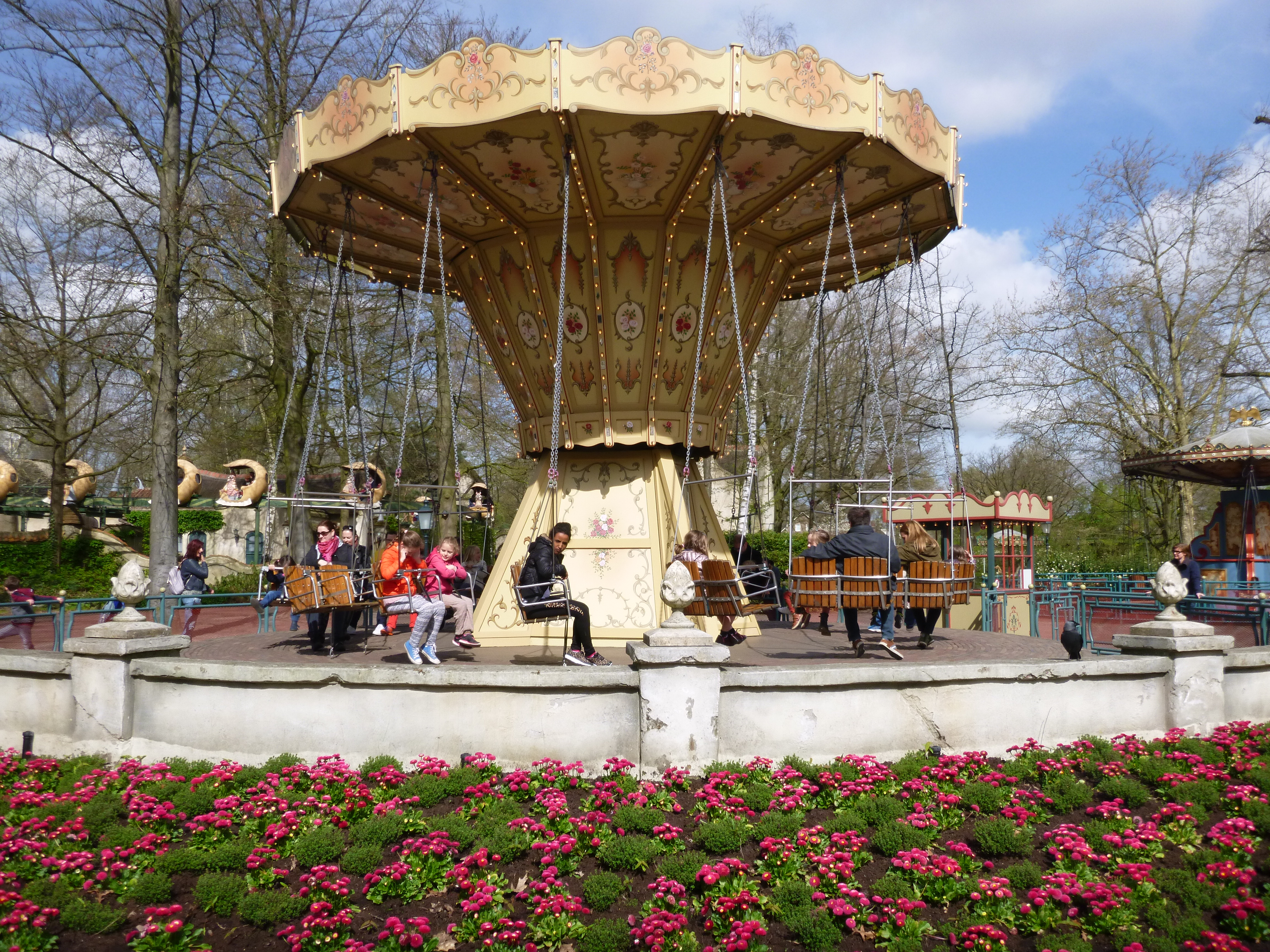 Grand carrousel à chaînes Efteling